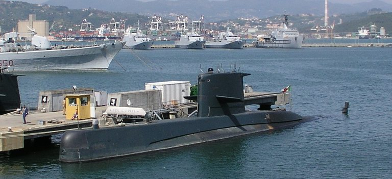 Sommergibile prini